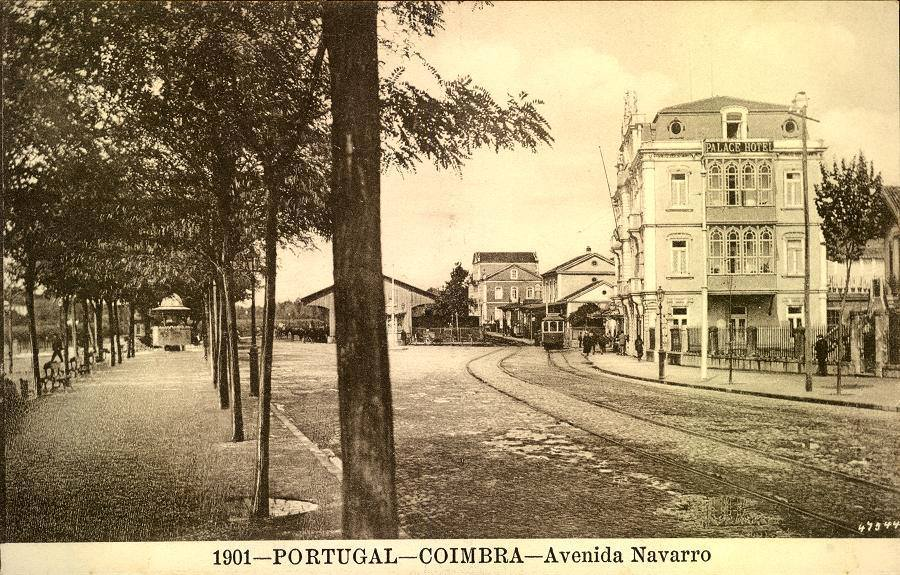 Palace Hotel, Coimbra, e antiga estação Coimbra-Cidade, em postal datado erradamente de 1901 — os elétricos só começaram a circular em 1911…